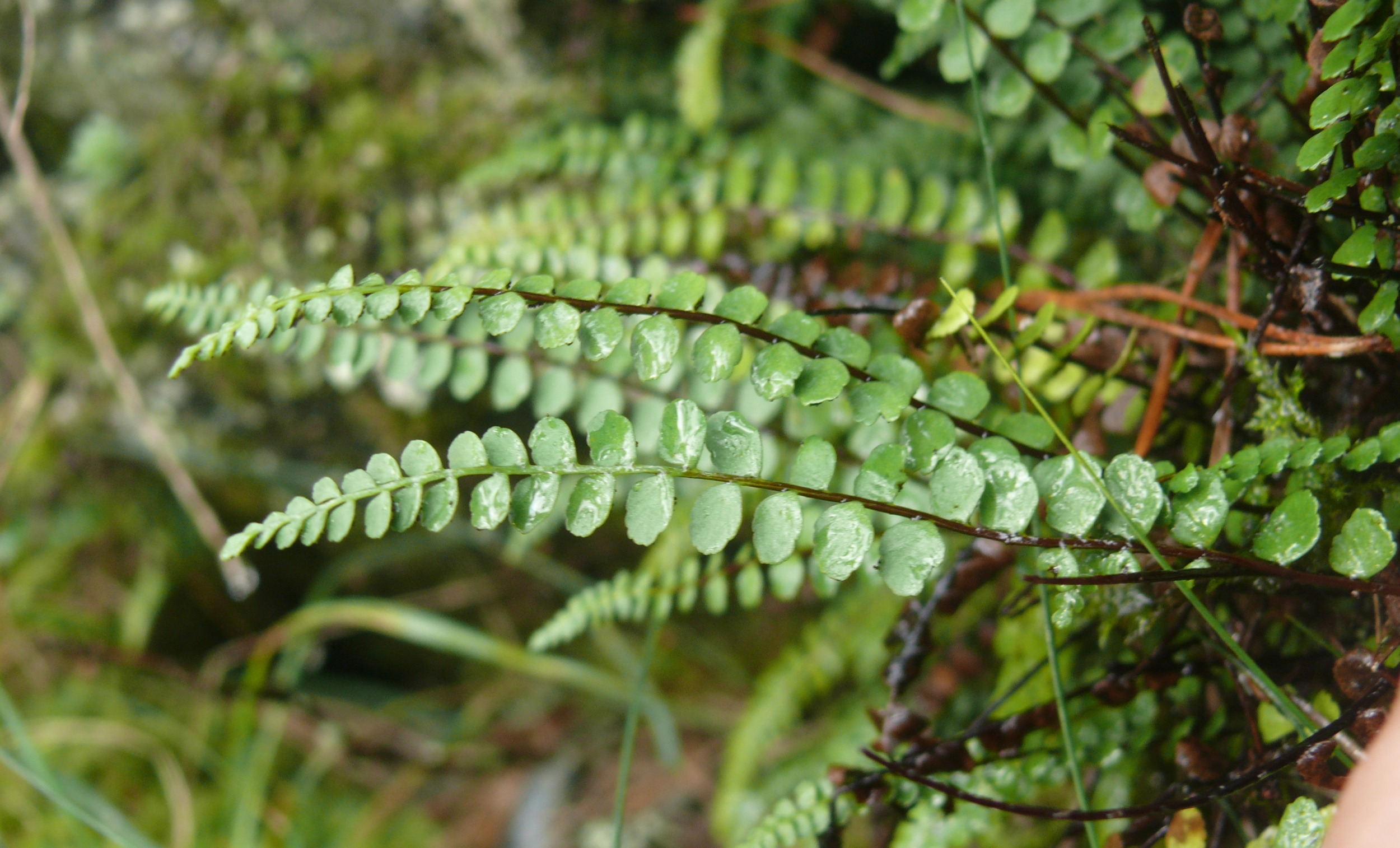 Asplenium adulterinum, Oberfranken